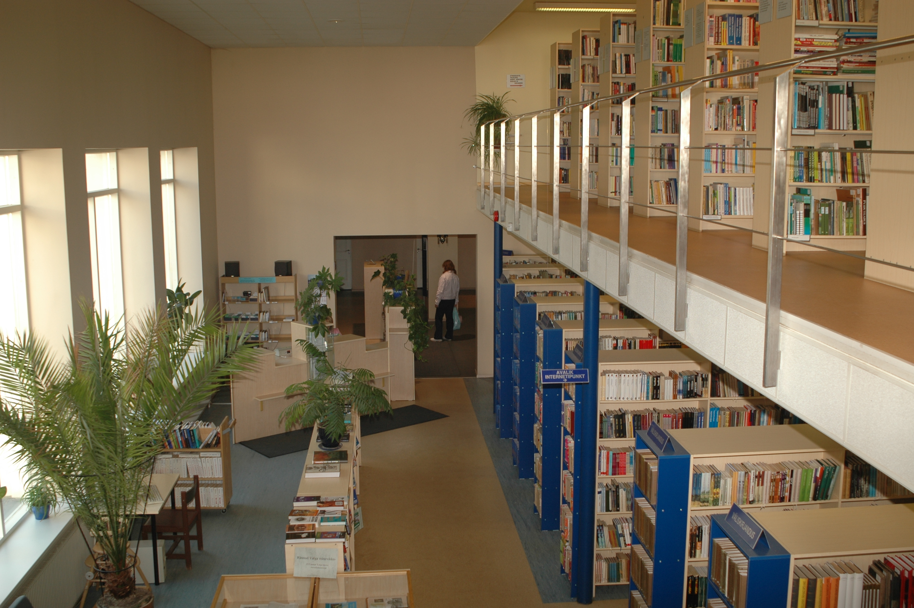 Fuajee